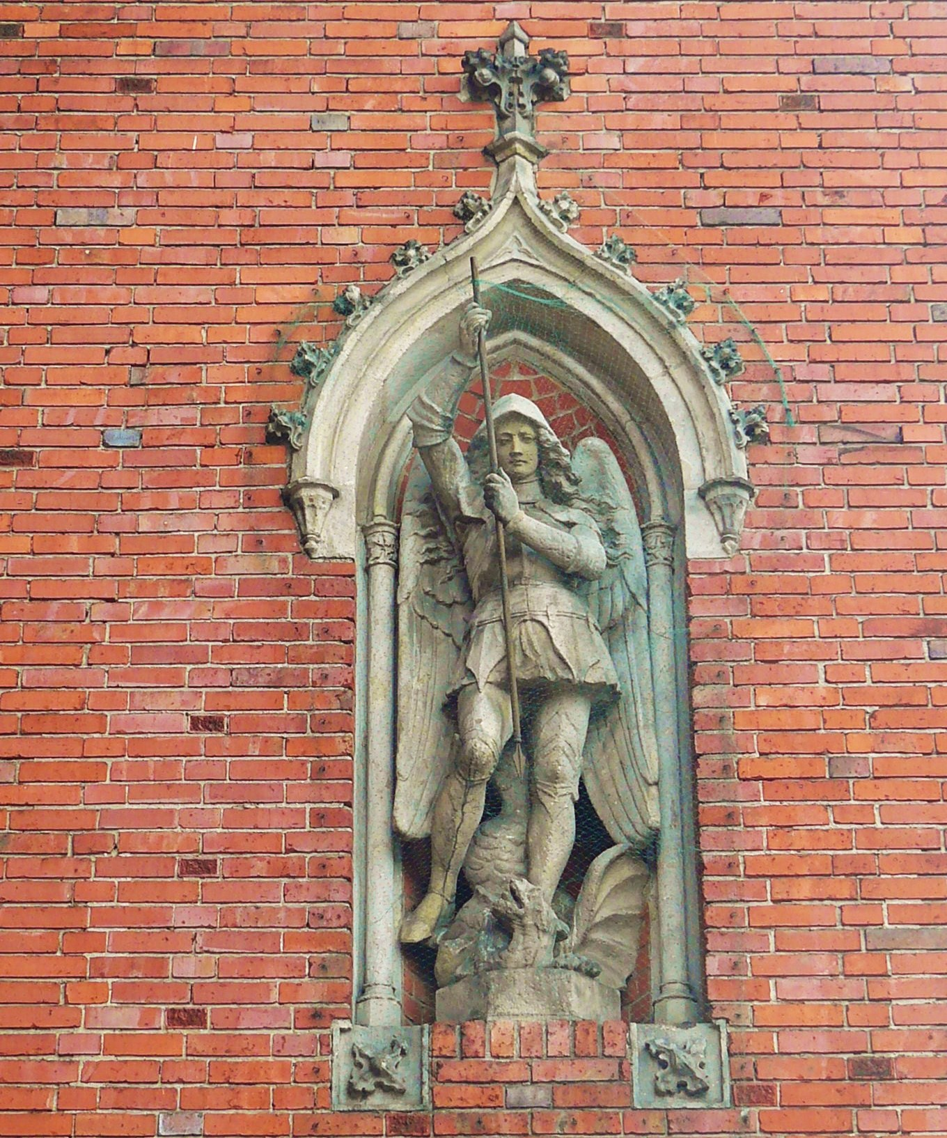 Poznań Jeżyce, ul. Słowackiego 54/60 - Szkoła Podstawowa nr 36 im. Henryka Sucharskiego, zespół zabudowań szkolnych